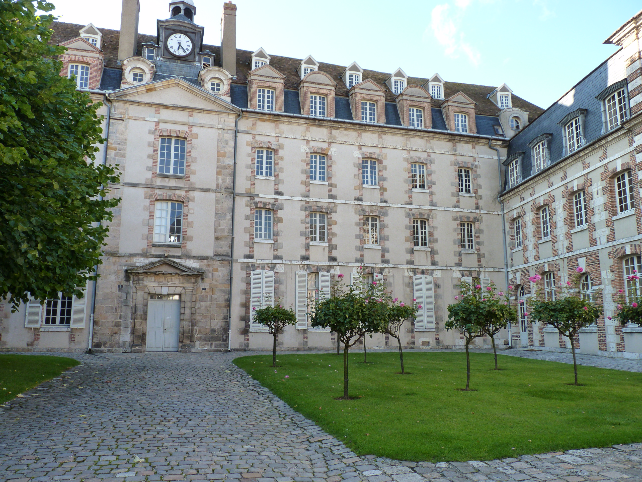 Ancien séminaire Saint-Charles, ancien bâtiment des Archives Départementales, 11 rue du Cardinal-Pie, Chartres, Eure-et-Loir (France).